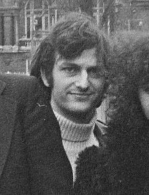 Persconferentie rond film "Alle dagen feest" in Amsterdam. V.l.n.r. de regisseurs Otte Jongerius, Orlow Seunke, Ate de Jong en Paul de Lussanet, scenarioschrijver Guus Luijters en schrijver Remco Campert. Daarvoor Peter Faber en Marcelle Meuleman. 26 januari 1976